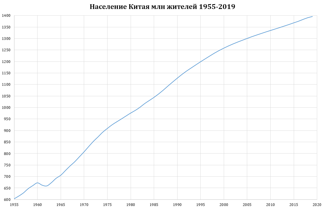 Население Китая 1955-2019 по данным статистики Китая